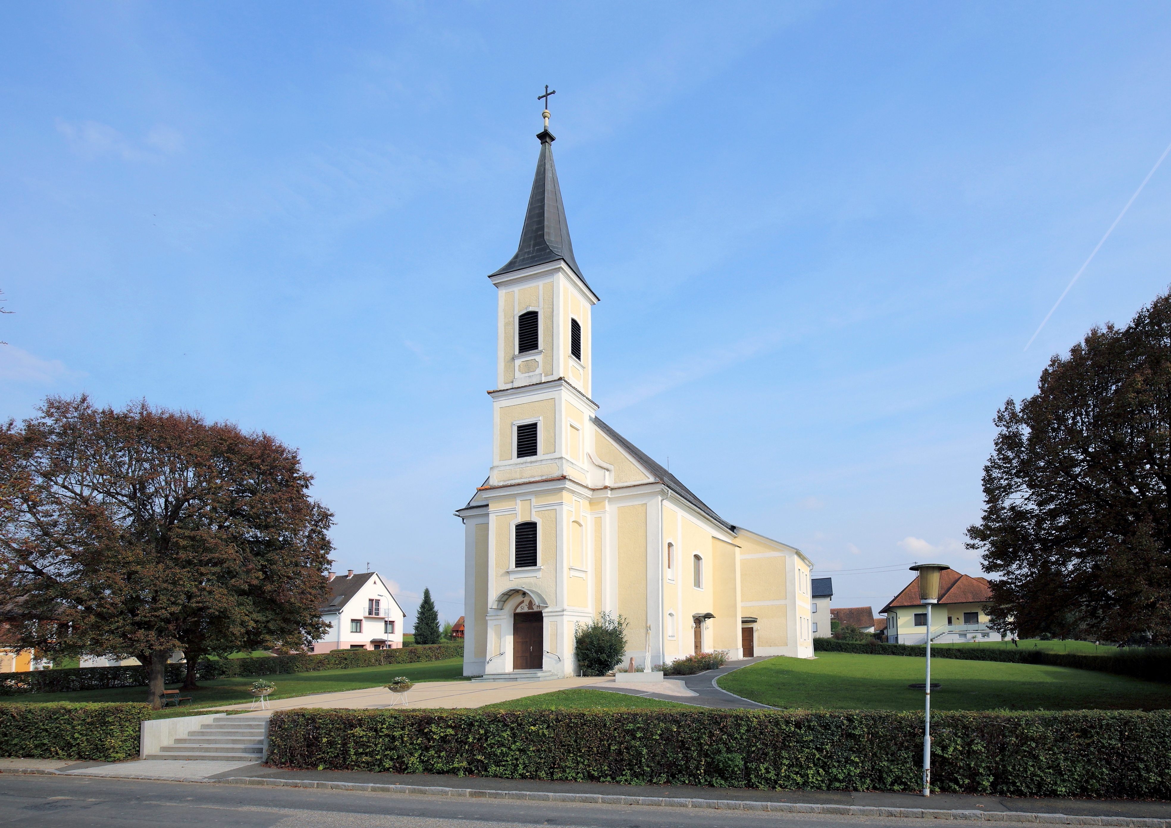 Westansicht der Pfarrkirche hl. Martin in Gerersdorf, ein Ortsteil der burgenländischen Gemeinde Gerersdorf-Sulz. Die Pfarrkirche mit einem vorgstellten viergeschossigen Westturm wurde 1810/11 errichtet.